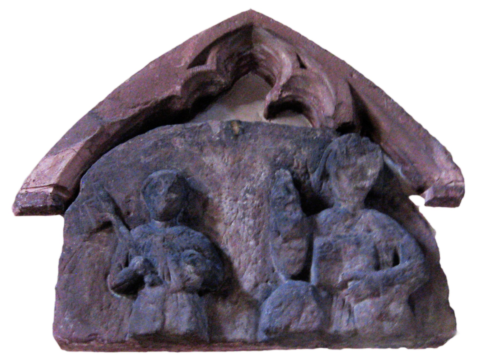 Relief in Merzig